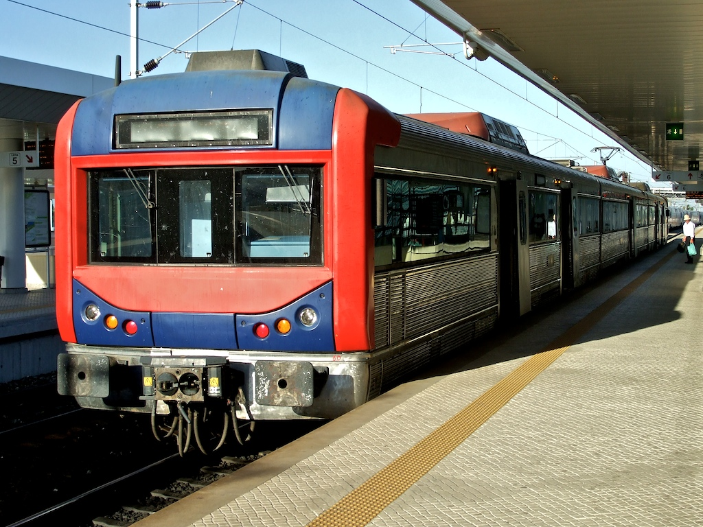 Tipo: Comboio Regional 3702 [Faro - Pinhal Novo] Local: Estação de Pinhal Novo [Linha do Sul, PK 37 • Linha do Alentejo, PK 15] Data e hora: 9 de Julho de 2008 [19h27] Material: Automotora 2260 [Unidade Tripla Eléctrica]